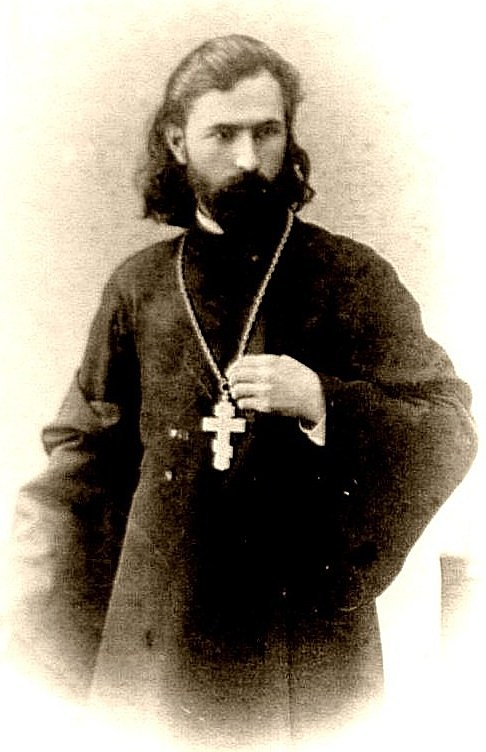 Русский священник и политический деятель Георгий Аполлонович Гапон (1870-1906)